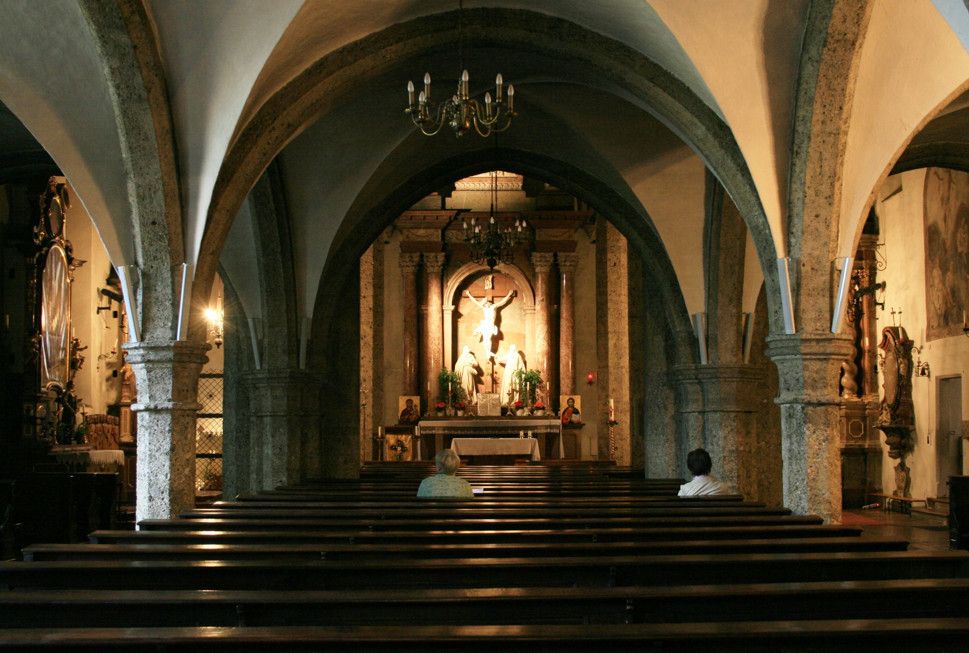 Kath. Filialkirche, Bürgerspitalskirche hl. Blasius